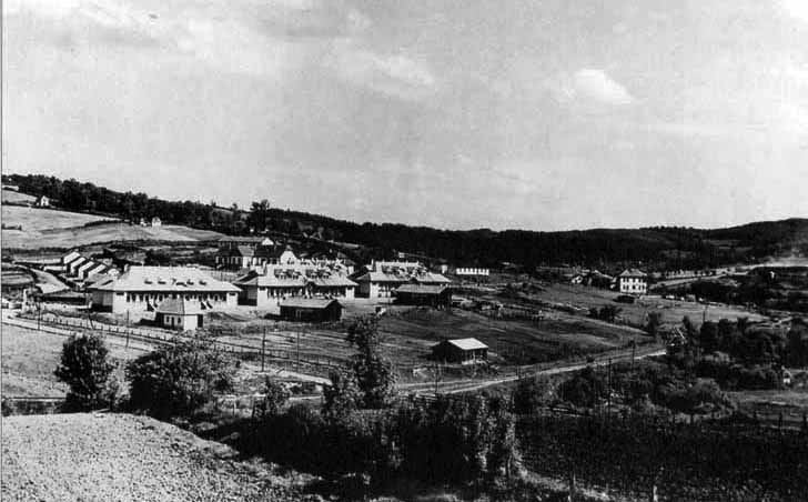 Stari Ugljevik (pogled na Koloniju - Mejdan) 30-ih godina 20. vijeka.